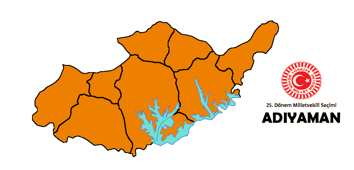 2015 genel seçim sonuçları